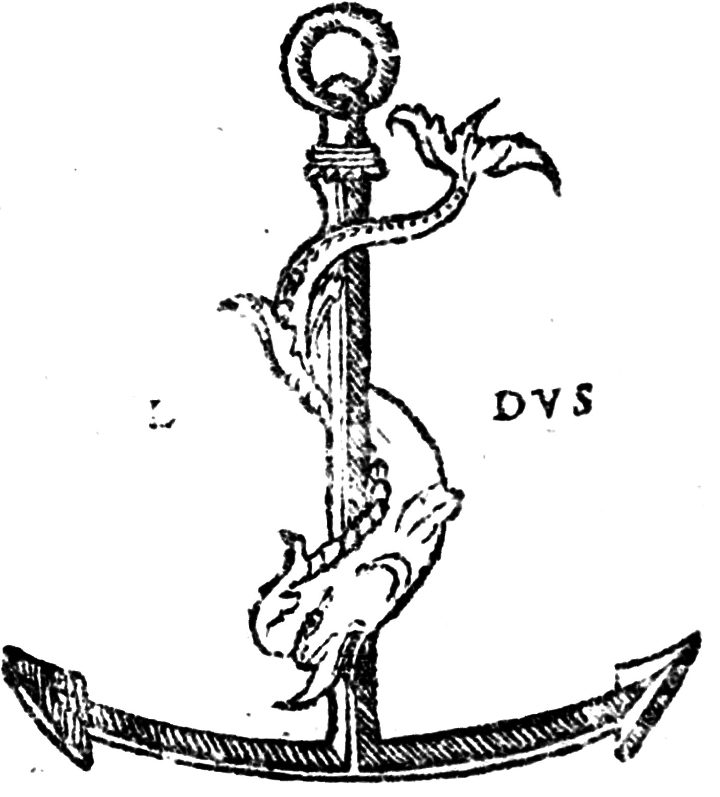 Pietro Bembo - Gli Asolani, prima edizione, Aldo Manuzio, Venezia 1505